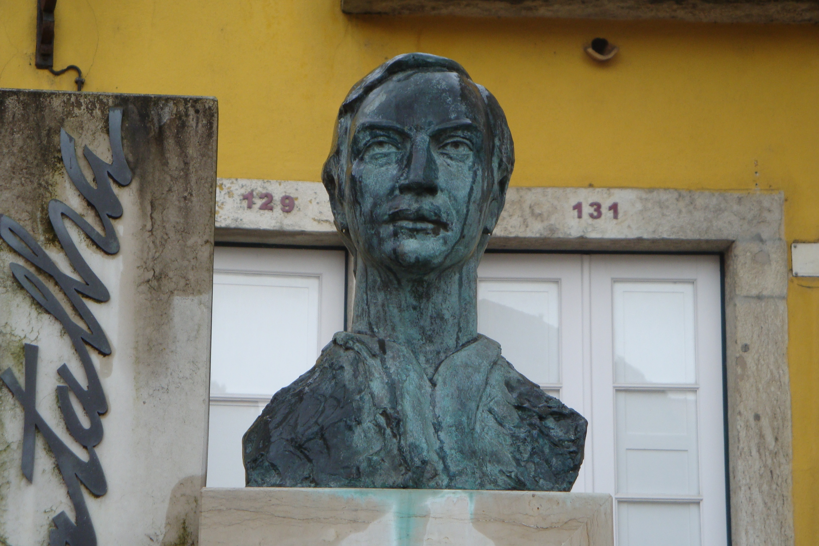 Maestro português, natural de Oeiras